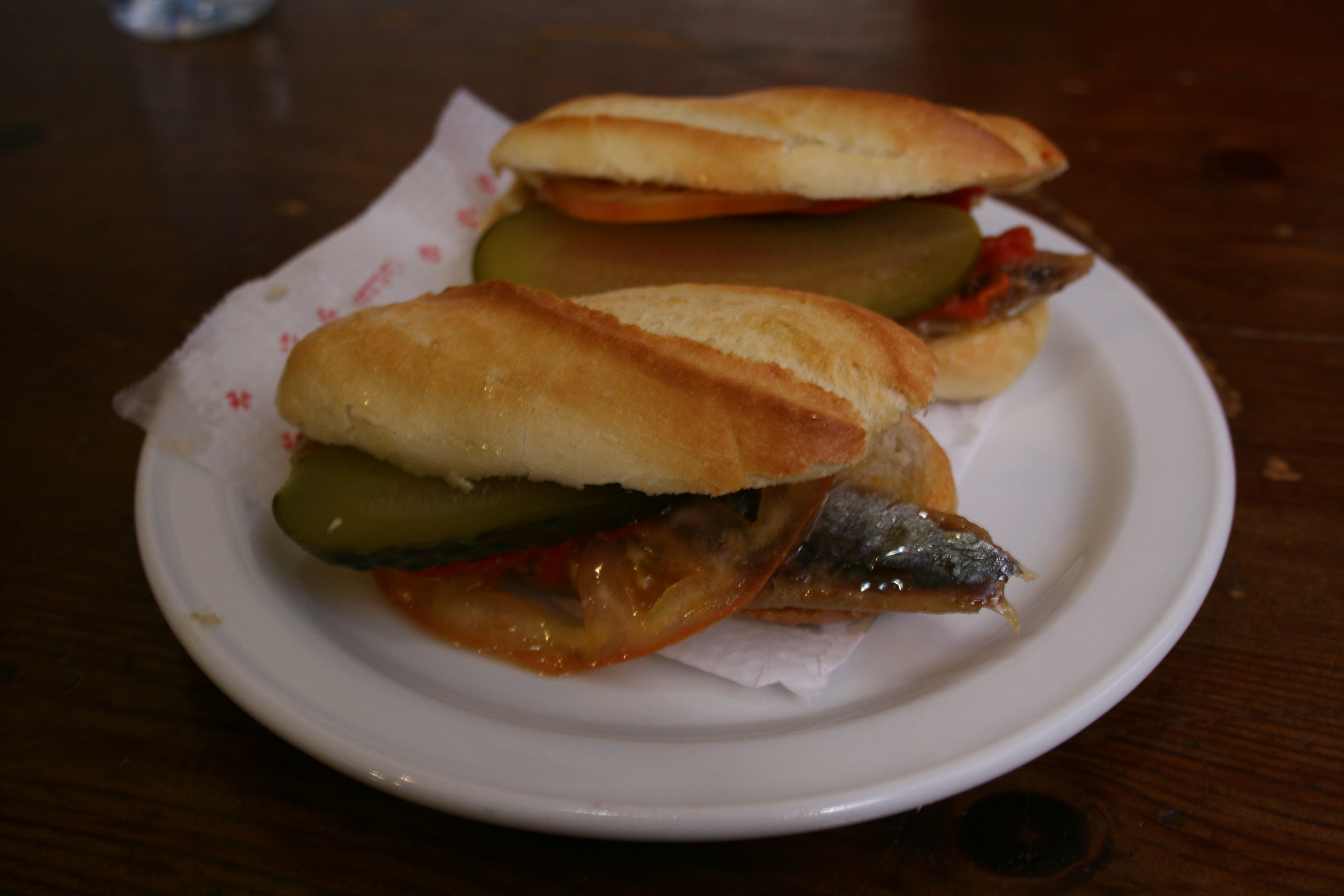 Bocadillo El Lince elaborado con tomate, pepinillo encurtido y una sardina rancia